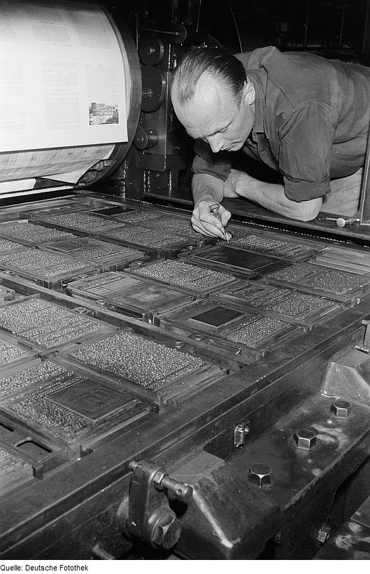 Original image description from the Deutsche Fotothek Mitarbeiter der Druckerei Offizin Haag-Drugulin